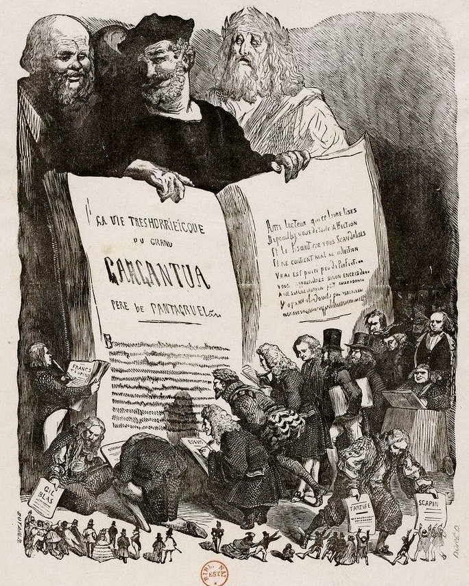 Gravure de Gustave Doré. Frontispice de l'édition de 1854